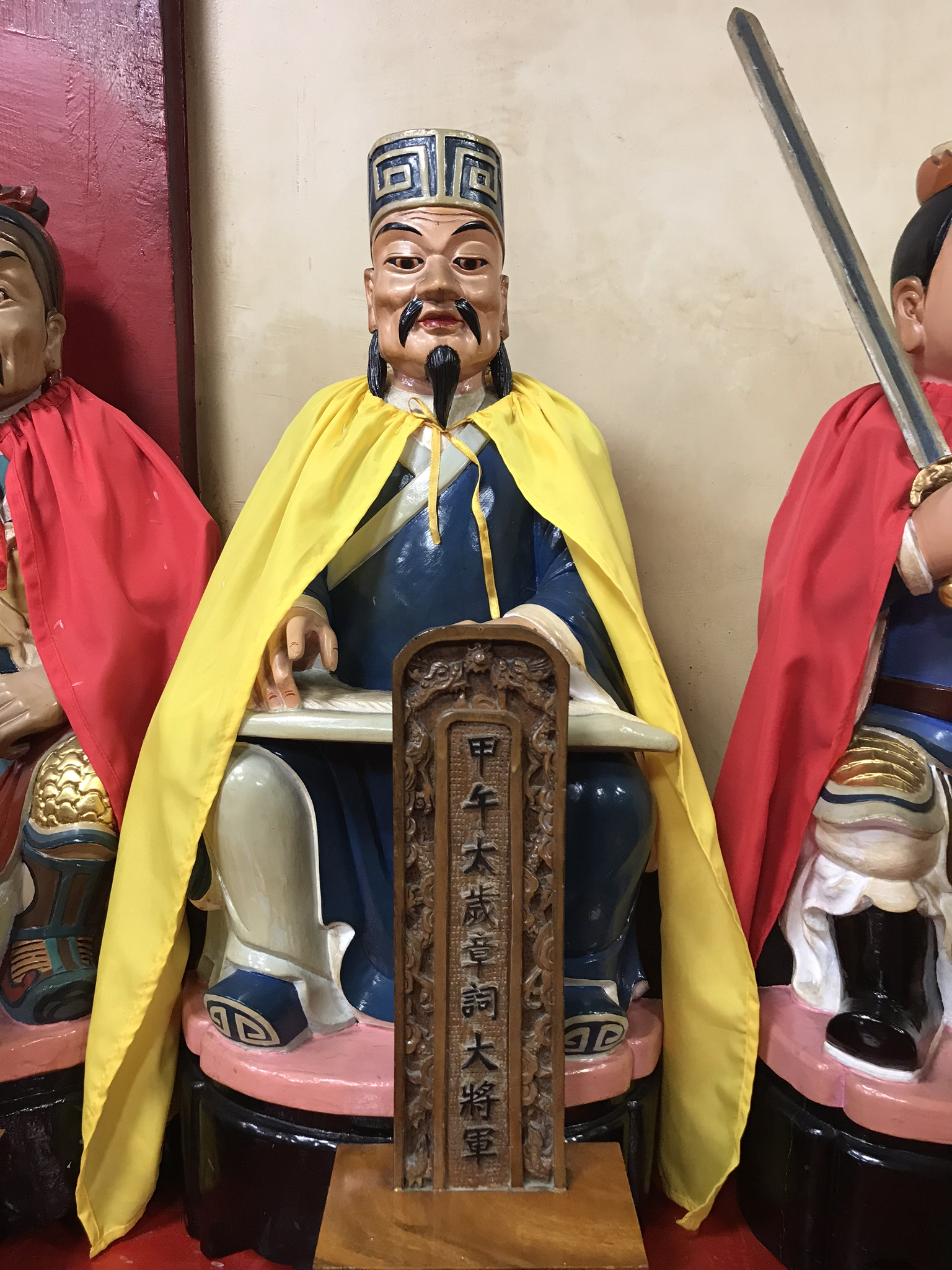 甲午太歲章詞大將軍神像